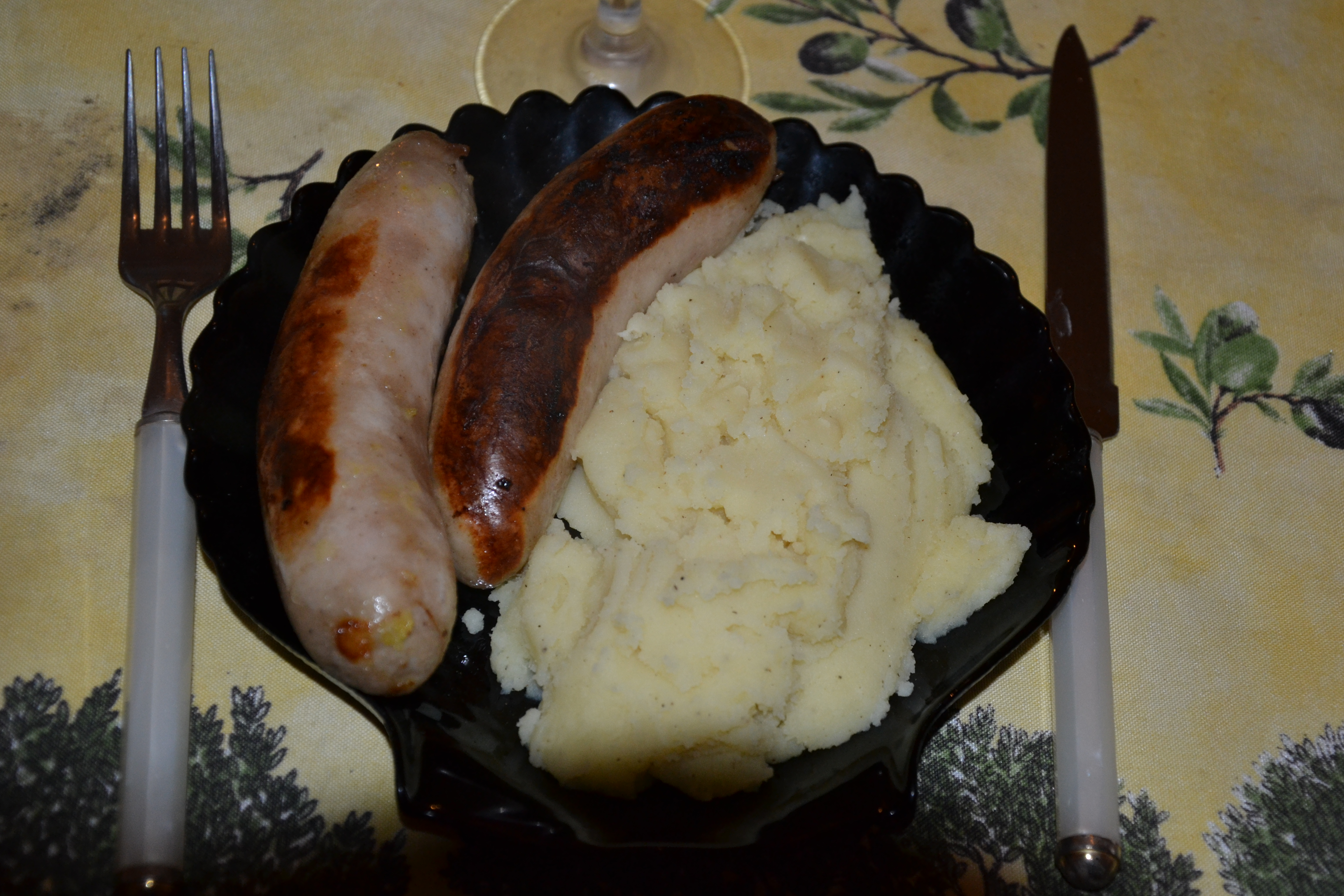 Saucisses blanche de Lorraine et purée